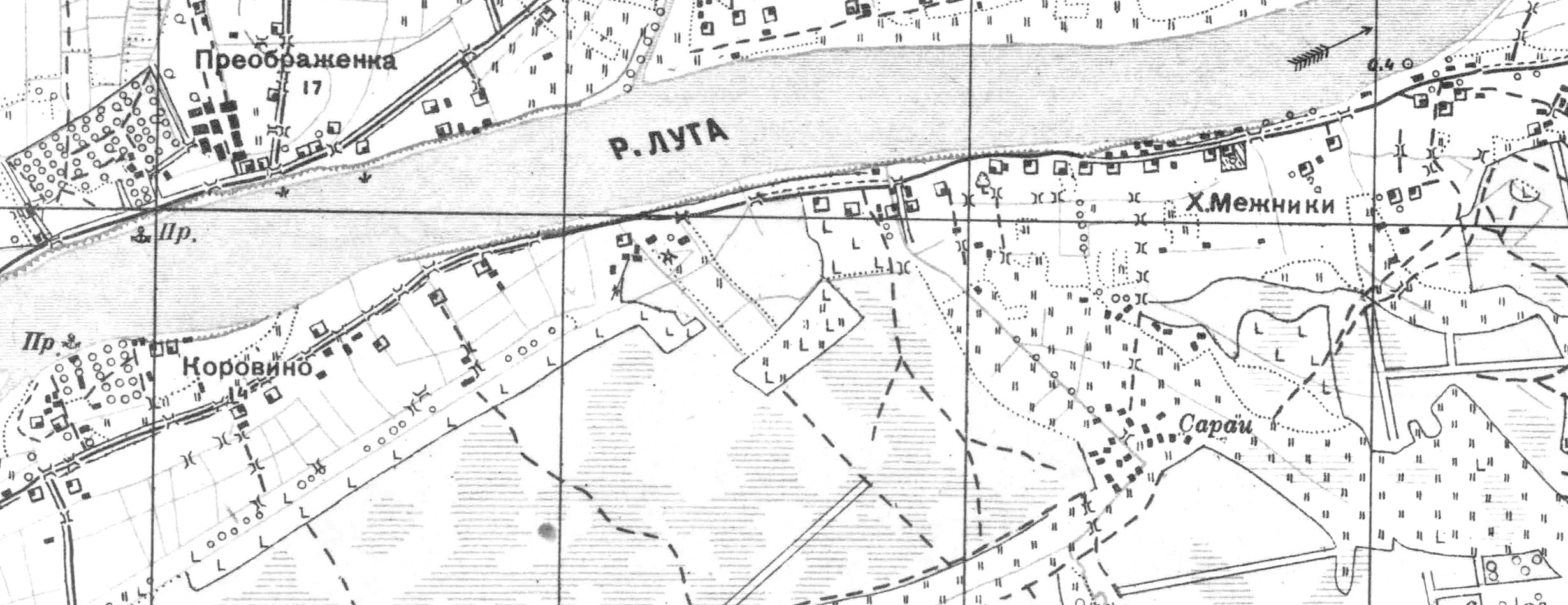 Топографическая карта Ленинградской области, квадрат О-35-21-А-б (Бол. Куземкино), деревня Межники.